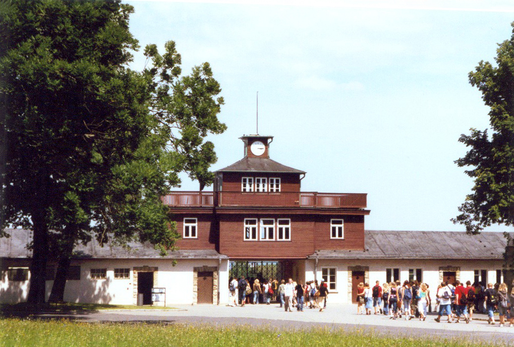 Das Torhaus, welches im KZ Buchenwald den Häftlingstrakt vom SS-/Verwaltungstrakt trennt. Im Eisentor ist der Spruch "Jedem das Seine" eingearbeitet. Durch dieses Tor mussten alle Häftlinge gehen, die in Buchenwald inhaftiert wurden. Die Uhr am Turm steht auf 15:15 Uhr, dem Zeitpunkt, als das Lager von amerikanischen Truppen befreit wurde. Diese Uhrzeit wurde jedoch nachträglich ein- und festgestellt.